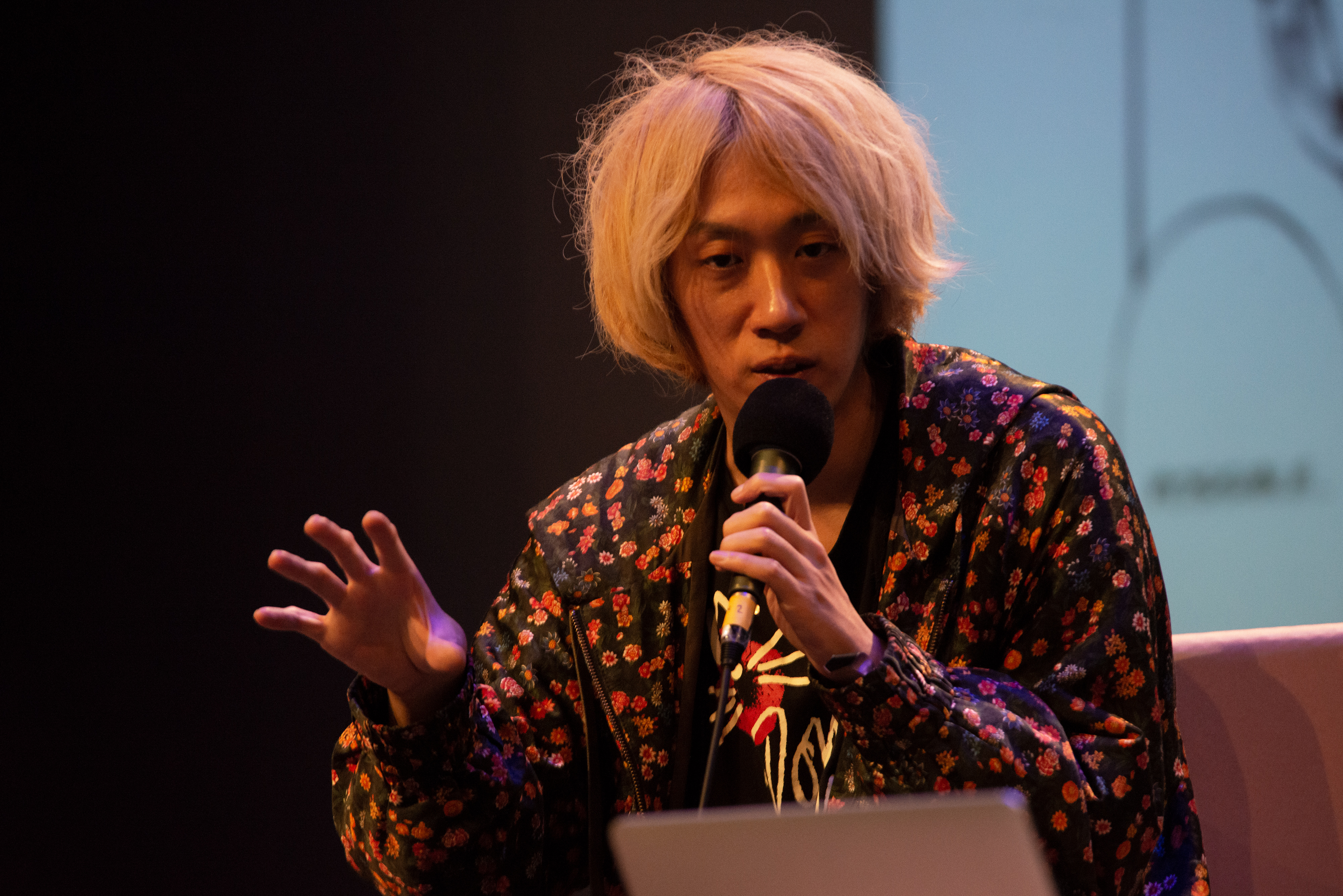 Rencontre entre le mangaka Inio Asano et l'auteur français Bastien Vivès, Festival International de la Bande Dessinée d'Angoulême 2020.